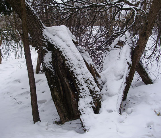 Так сейчас выглядит ива, на которой фашисты повесили Веру